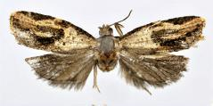 Isodemis hainanensis